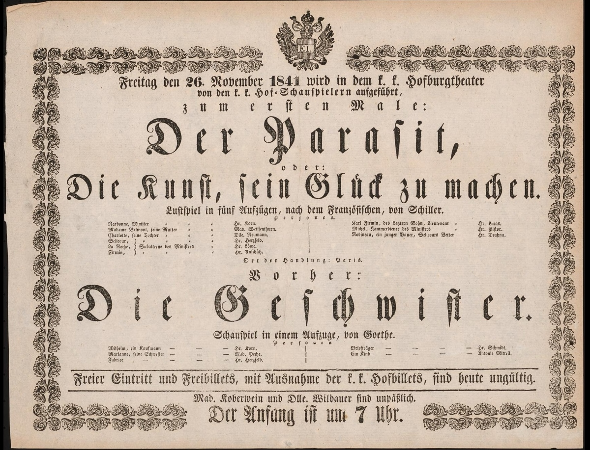 Plakat Burgtheater Parasit 1841